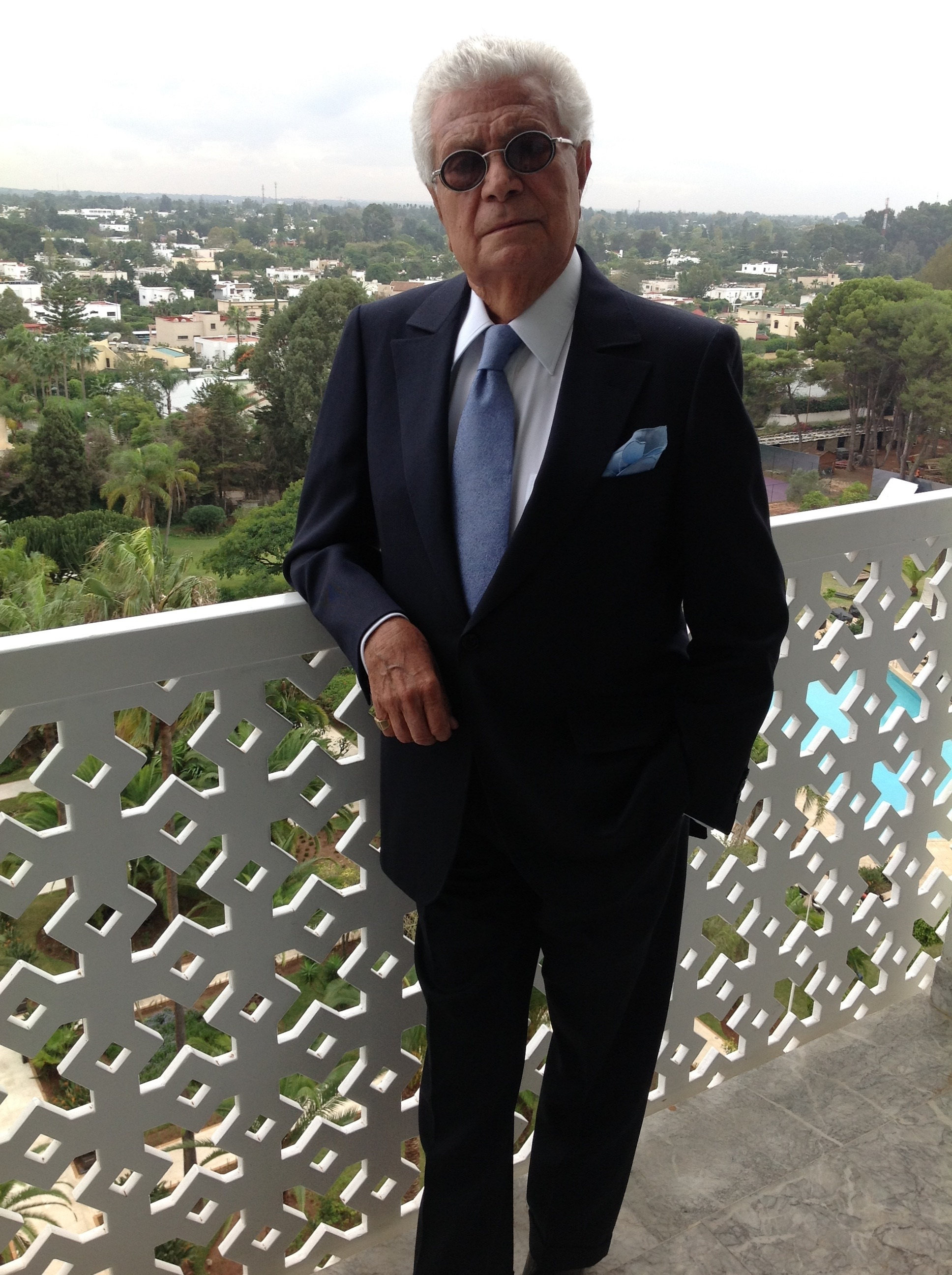 la photo de Francesco Smalto